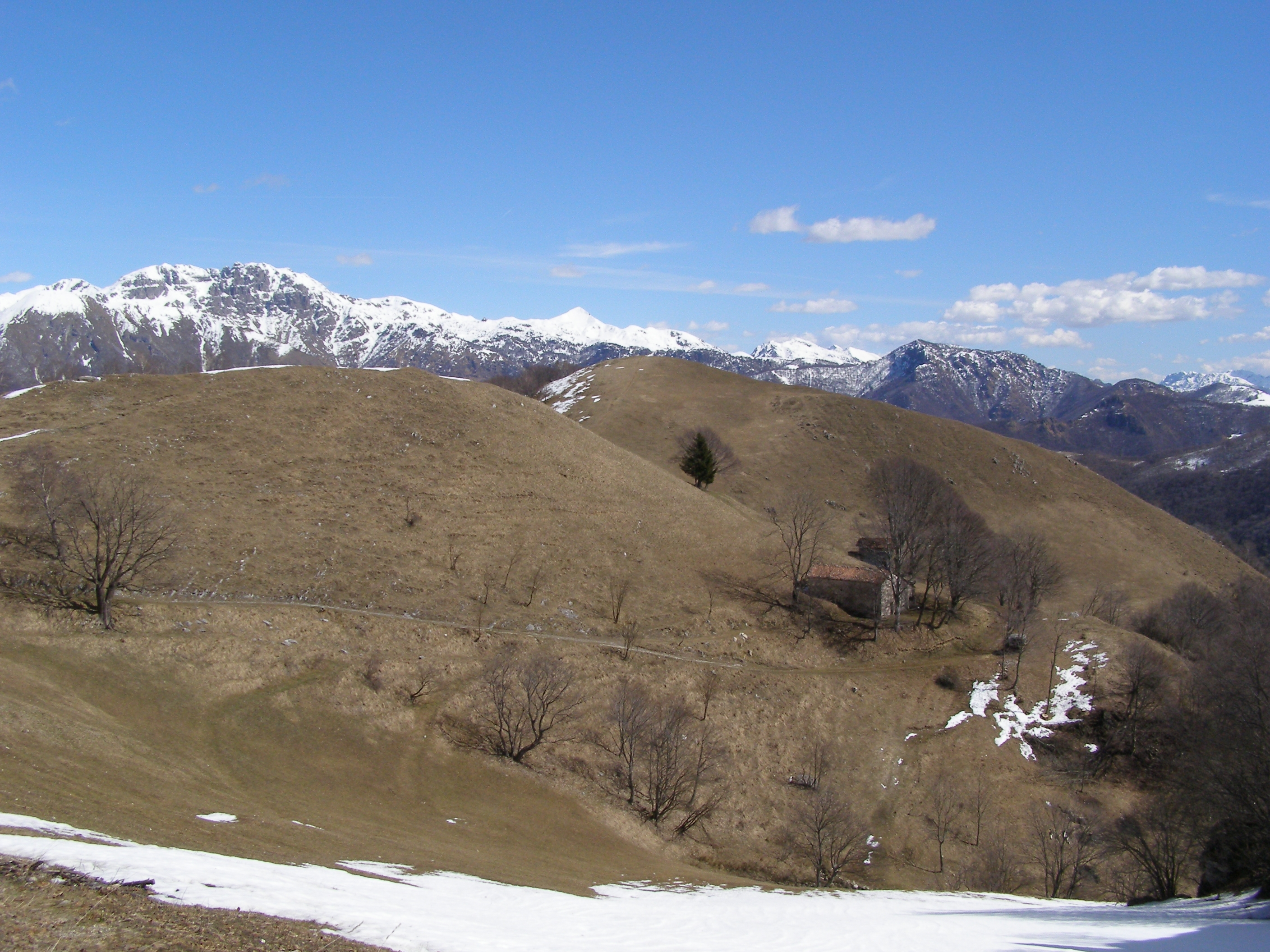 Piani Resinelli